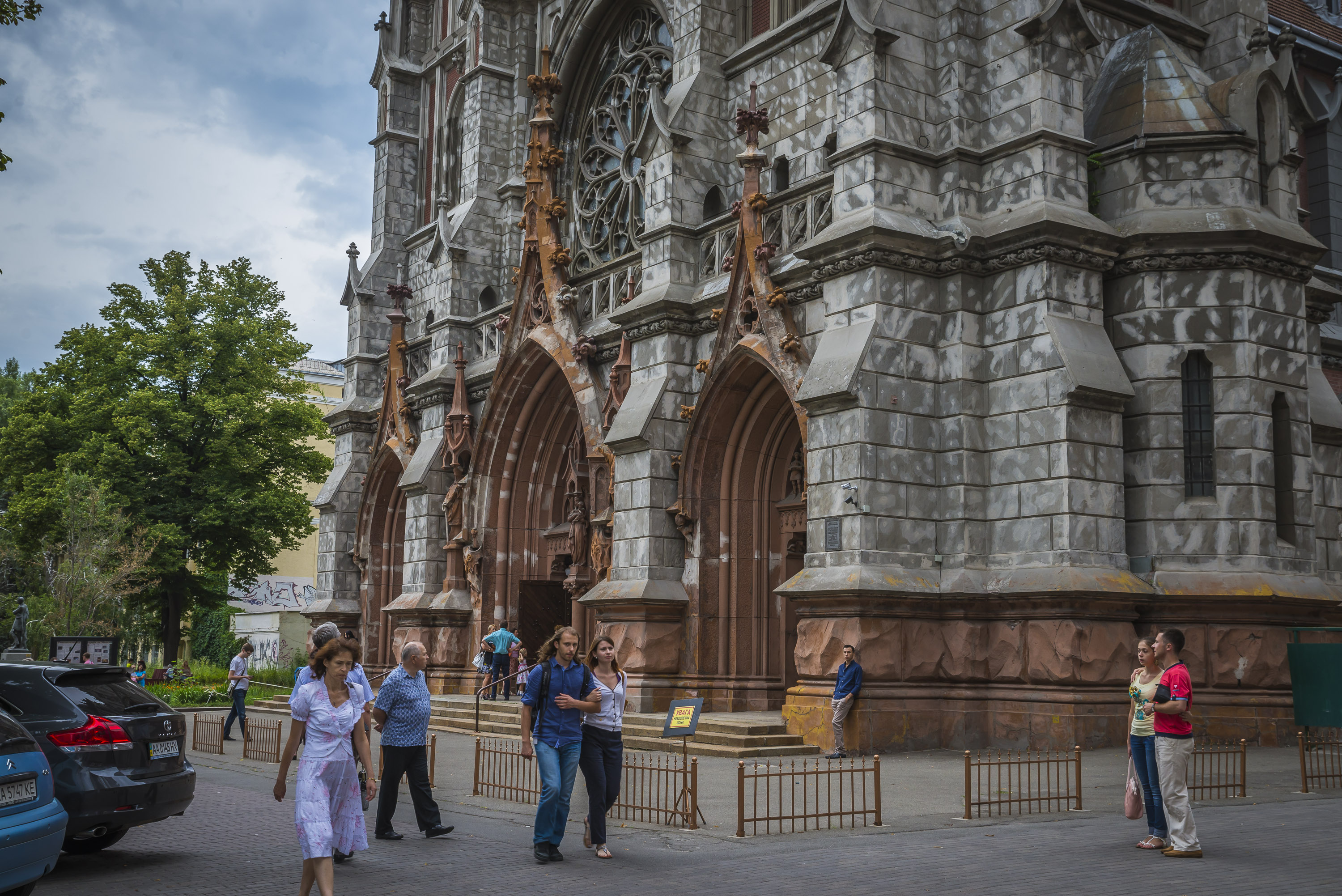 Костьол св. Миколая, Київ, Червоноармійська вул., 77